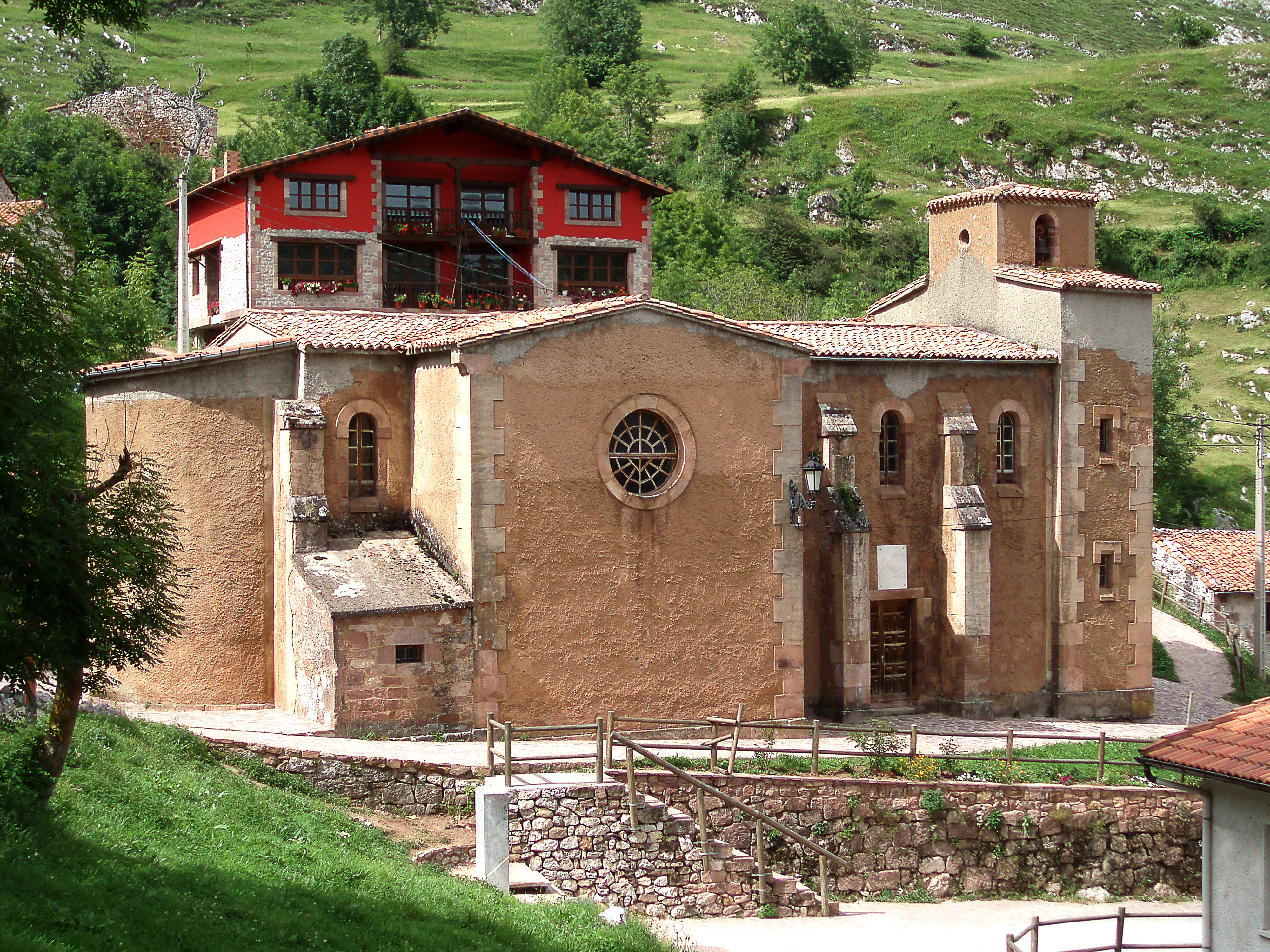 Se trata de adivinar el lugar de la fotografia....... Tresviso pertenece a la comarca de Liébana., en pleno Macizo Oriental de los Picos de Europa, con 16,2 kms2 de extensión, un solo núcleo urbano y a penas 60 habitantes. Limita con Asturias por el norte y el oeste, y con Cillorigo y Peñarrubia por el sur y el este. Situado dentro del Parque Natural de los Picos de Europa y en la ladera del río Urbión –afluente de rio Deva, al que se une en el Desfiladero de la Hermida-, tiene agrestes paisajes y altos picos, con un difícil acceso desde Cantabria, se accede al pueblo desde el Desfiladero de la Hermida, por Urdón, a través de un camino impresionantepara. Poder llegar con coche se necesita dar un rodeo, entrando desde Asturias, por Panes y Arenas de Cabrales –por este camino, su comunicación con los demás municipios de Liébana y con los de la costa cántabra, ya resulta fácil. Su historia va unida a la de Liébana y por restos megalíticos en sus altos, debió contar con poblamiento en su Prehistoria En el Alto Medievo –a mediados del siglo IX-, se le nombra –por ventas- en el Cartulario de Santo Toribio de Liébana; y, siglos después, se refleja –en el mismo- sus formas de vida –dedicación al pastoreo y a la fabricación de quesos mezcla de leche de vaca, cabra y oveja, el rico queso picón Por su pobreza y aislamiento, a penas guarda patrimonio arquitectónico. Tuvo, en el XVIII, una ermita, la de San Pedro, que fue sustituida, a principios del XX, por su actual parroquia –mayor y con ábside y torre. En lo civil, se destaca la popular y austera arquitectura de la casa montañesa, a base de piedra, madera y teja –de anchos tejados a dos bandas, hoy se ha mezclado con otras arquitecturas OLYMPUS DIGITAL CAMERA